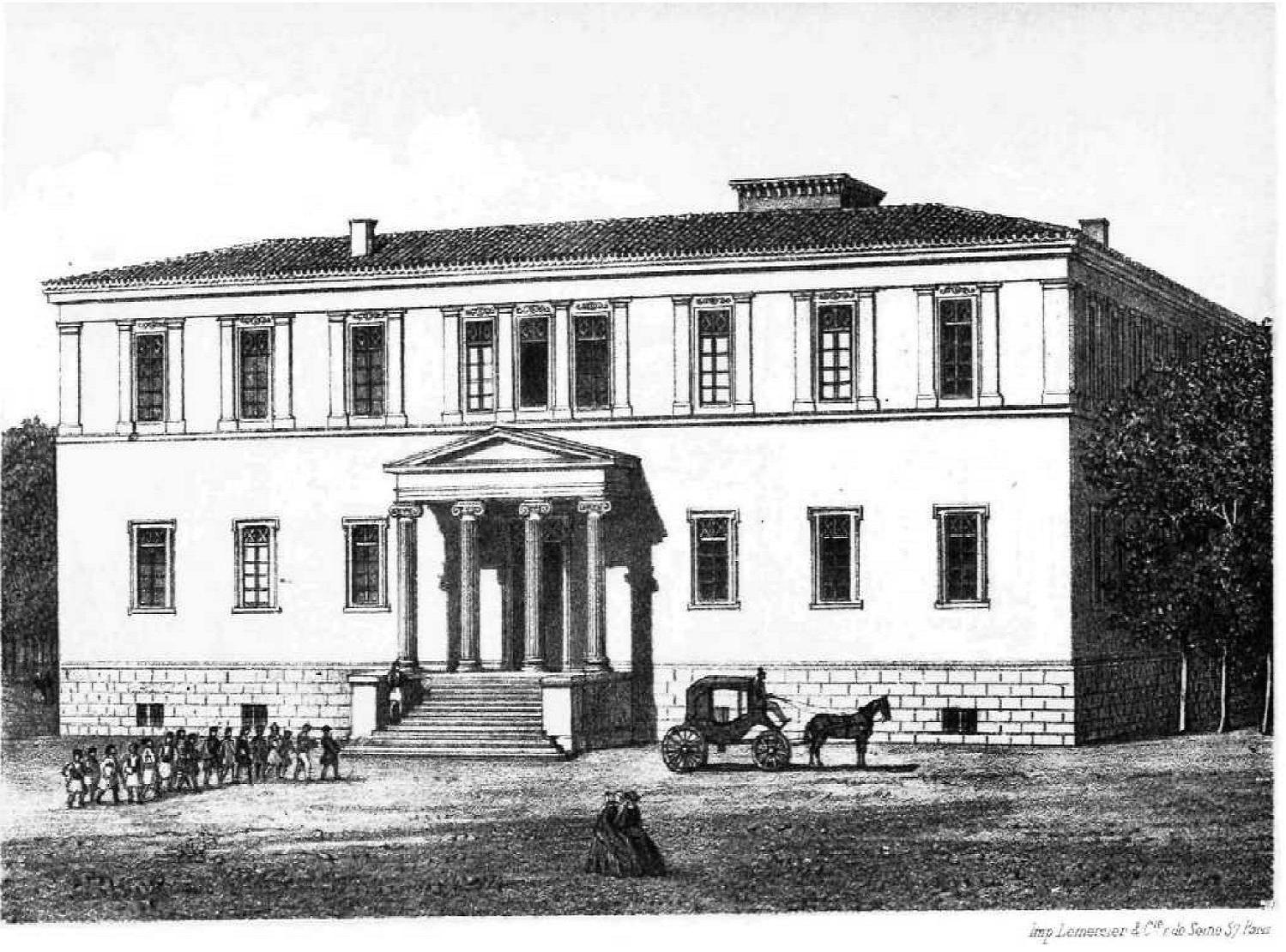 Historische Aufnahme der "Barbakeion Schule" in Athen, 19. Jahrhundert